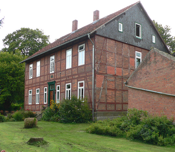 Wilhelm Busch Haus Mechtshausen und Sterbehaus